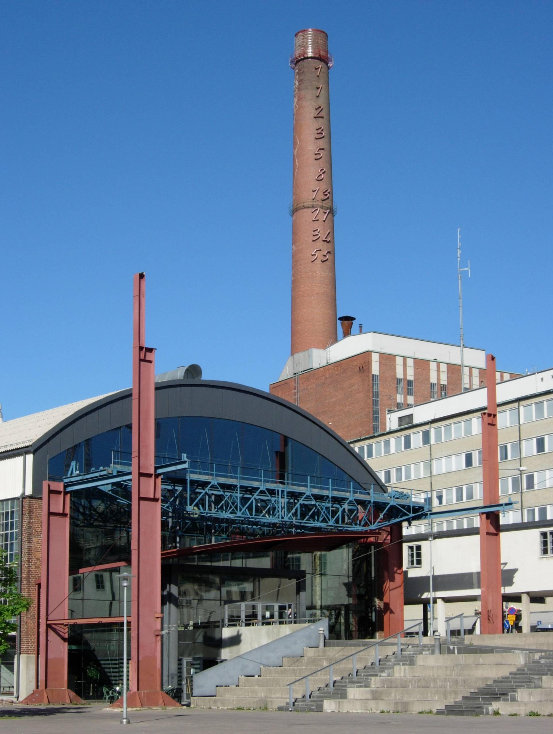 Turun konservatorio vasemmalla, taustalla Turku Energian savupiippu. Kaarevakattoinen rakennus on Sigyn-sali, entinen telakkahalli.